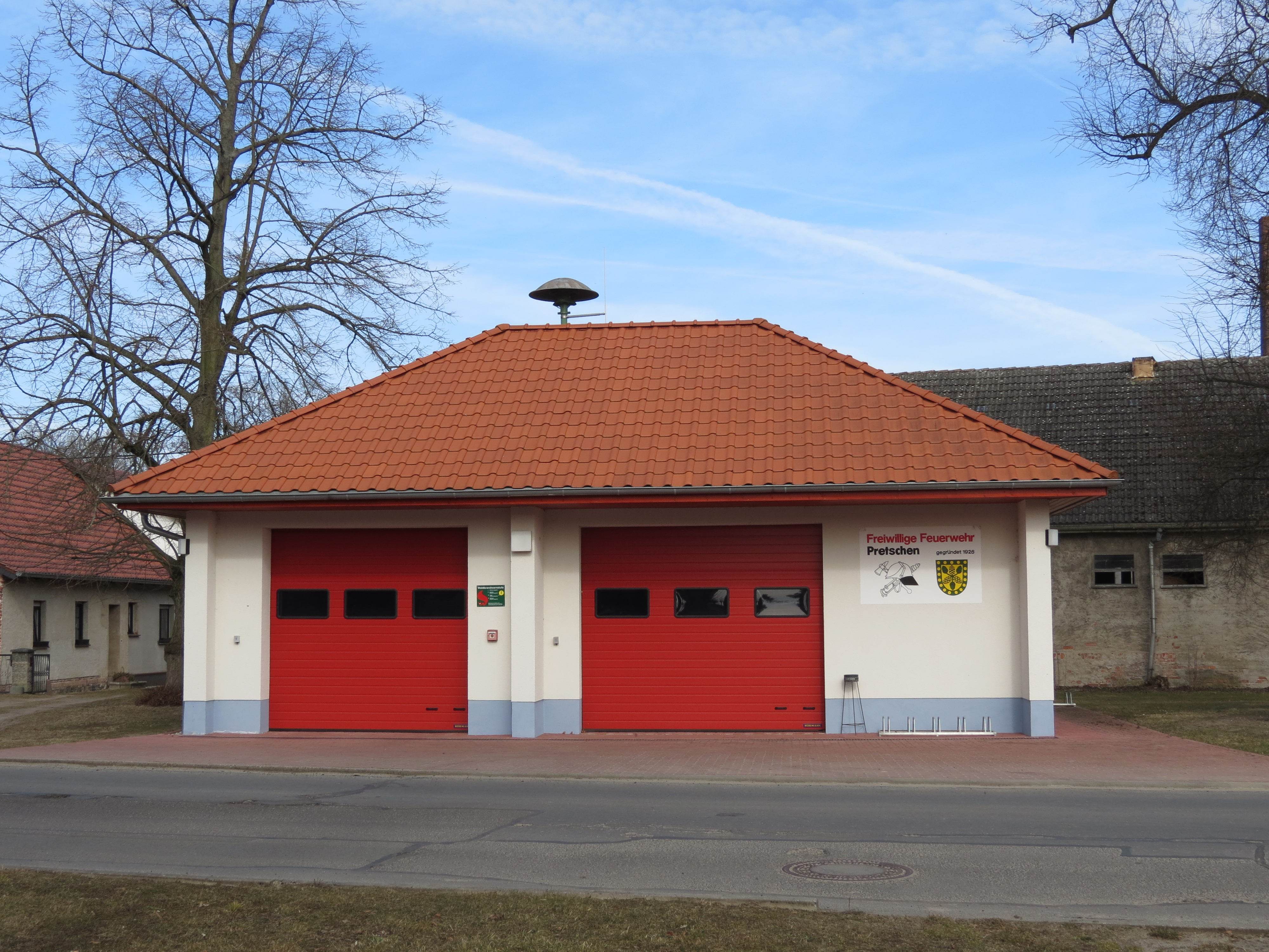 Pretschen, Feuerwehrhaus, Gemeinde Märkische Heide, Lkr. Oder-Spree, Brandenburg, Deutschland